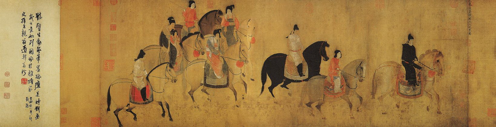 虢国夫人游春图